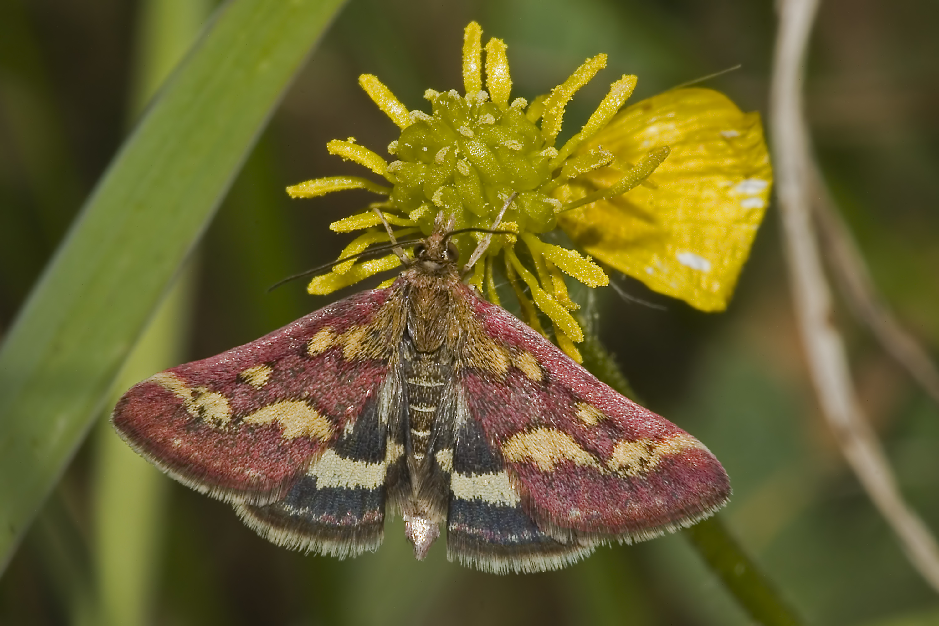 Pyrausta purpuralis